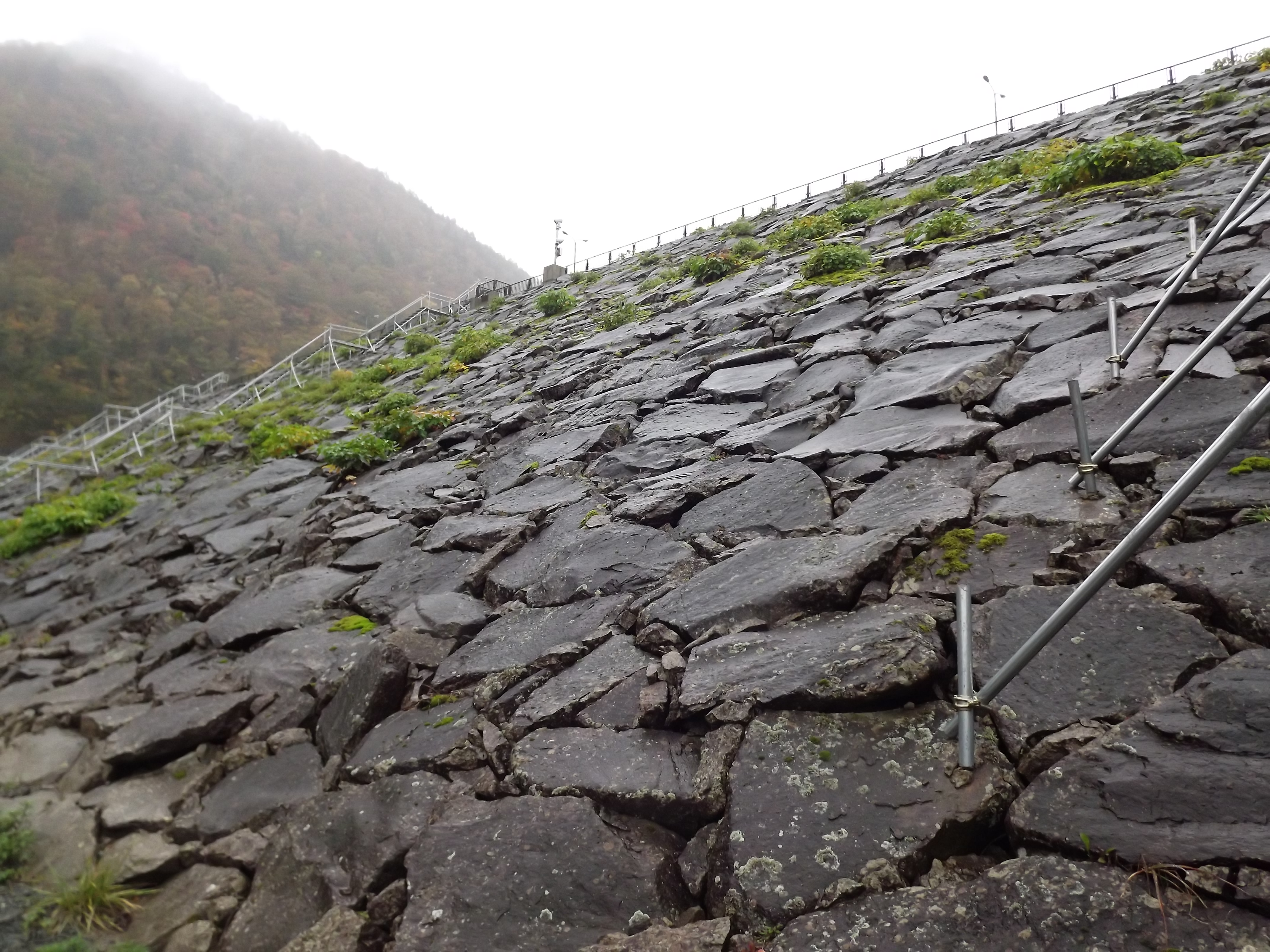 石淵ダムロックフィル堤体